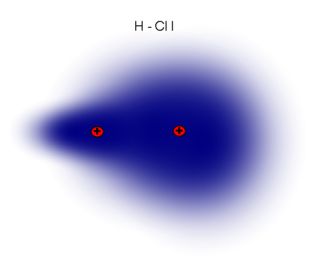 Bildbeschreibung: Polare Atombindung am Beispiel H-Cl Fotograf/Zeichner: H. Hoffmeister (erstellt mit Word - wer die Vektorgrafik möchte, kann sich jederzeit melden) Datum: 13.1.2006